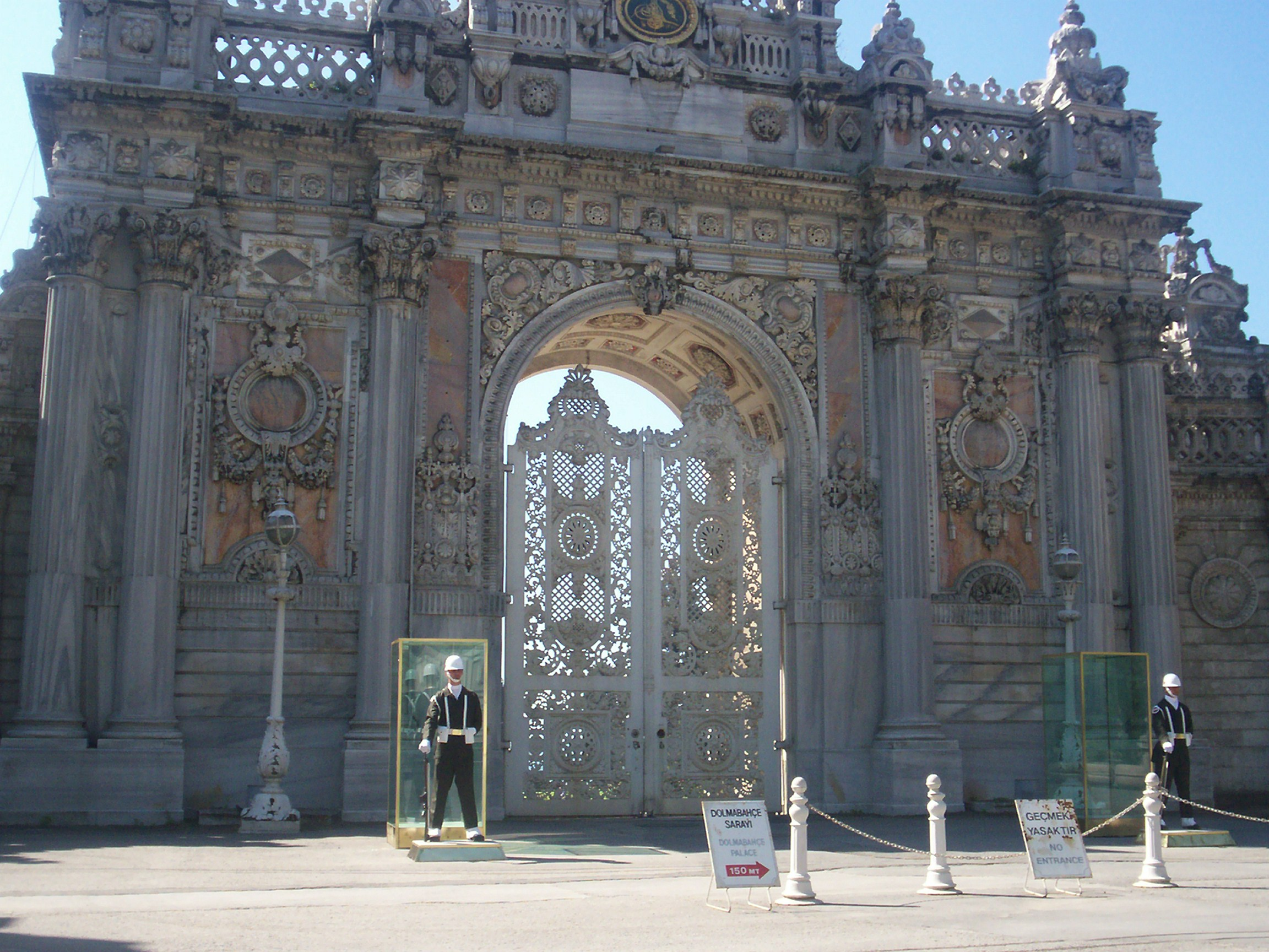 Kendi fotoğraf makinemle çektim.